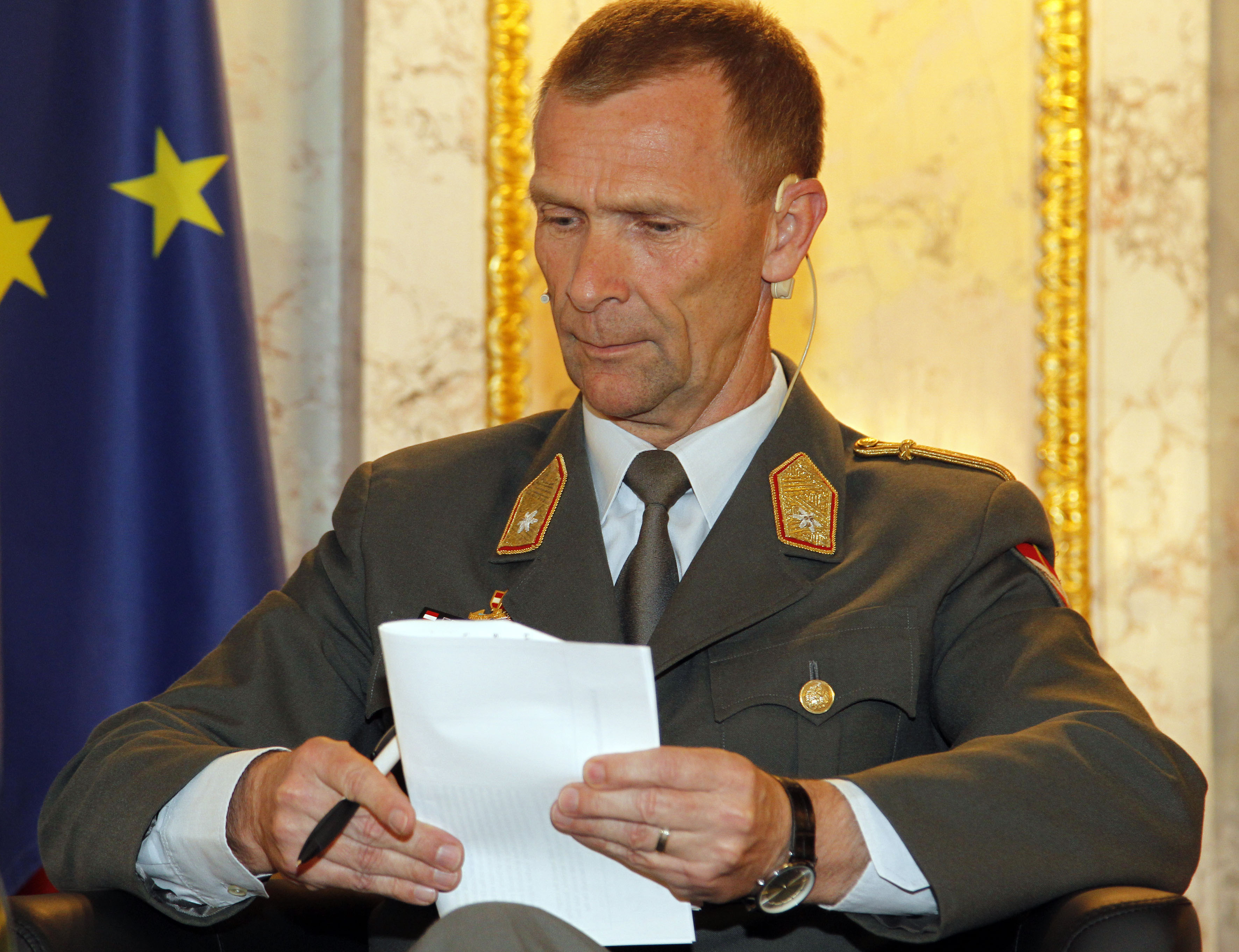 Die UNO im 21. Jahrhundert - Steht sie noch für globale Ordnung? Podium : Univ.-Prof. MMag. Dr. August Reinisch, "Juridicum Wien", Bgdr Dr. Walter Feichtinger, "Institut für Friedenssicherung und Konfliktmanagement", Dr. Gerhard Pfanzelter, "ehemaliger Botschafter bei den vereinten Nationen", Moderation: Mag. Julia Raabe, "die Presse" Foto: Mahmoud